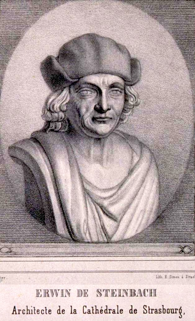 Erwin von Steinbach (1244 - 17 janvier 1318, Strasbourg) était un architecte et sculpteur alsacien, considéré comme le fondateur de la Cathédrale de Strasbourg.